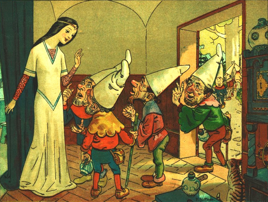 Franz Jüttner (1865–1925): Illustration from Sneewittchen, Scholz' Künstler-Bilderbücher, Mainz 1905